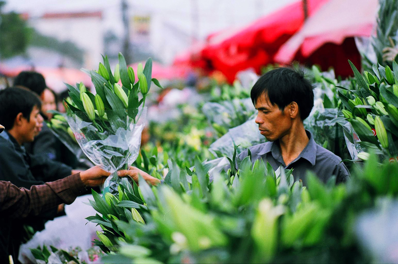 Tet flower market, Vietnam.